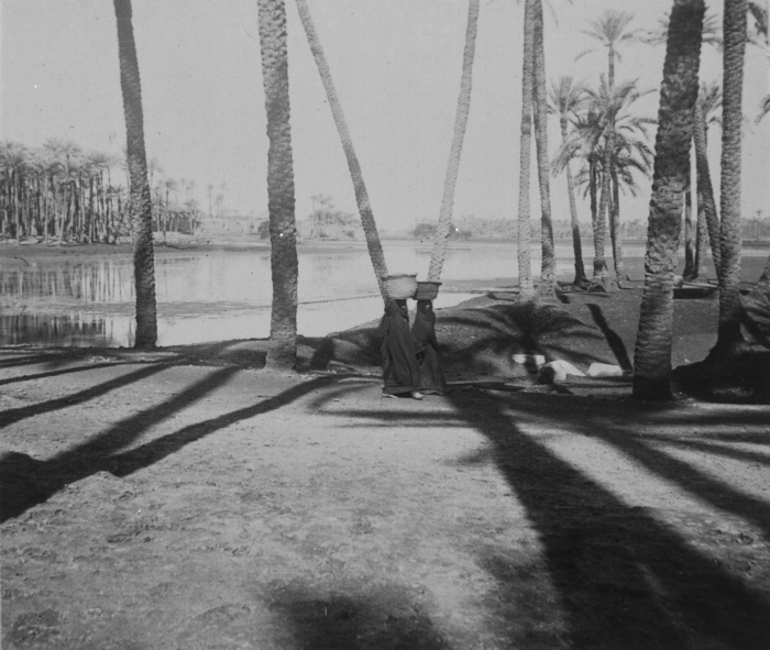 Exclusief passe-partout